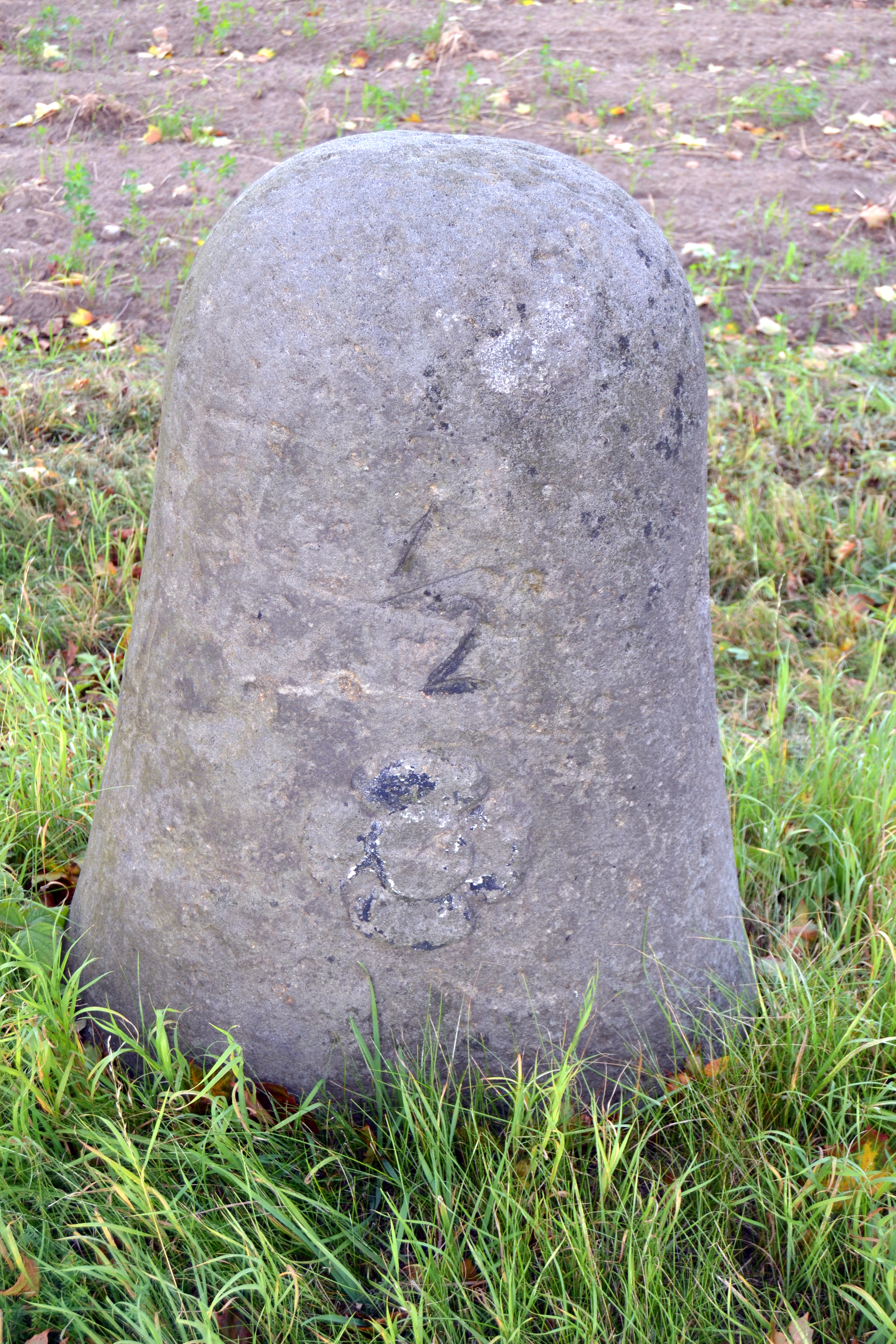 Halbmeilenstein, bei km 30,8 an der Bundesstraße 1/5 (ehemals Reichsstraße 1), bei Jahnsfelde